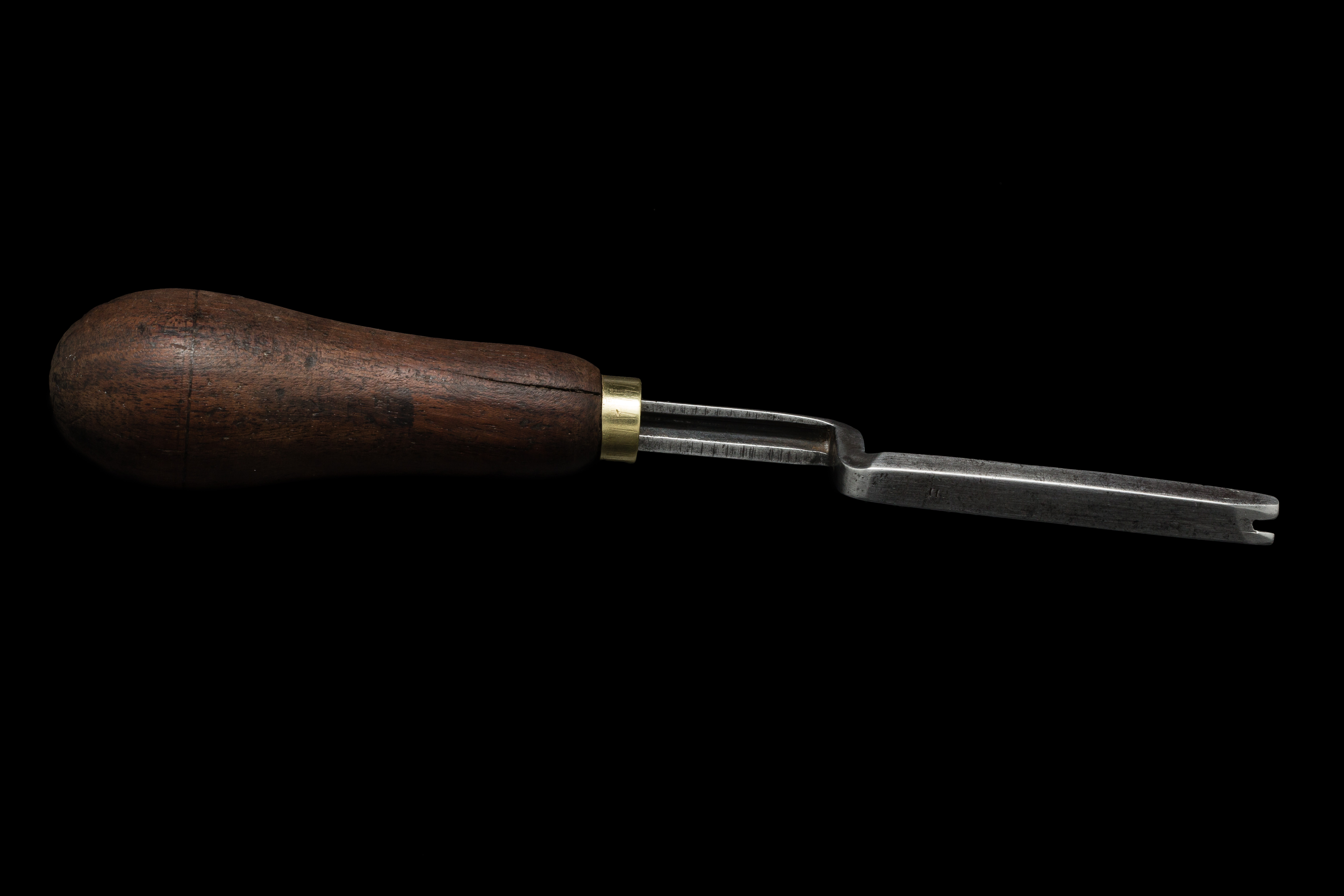 Abat-carre de marque Blanchard, modèle n°3.